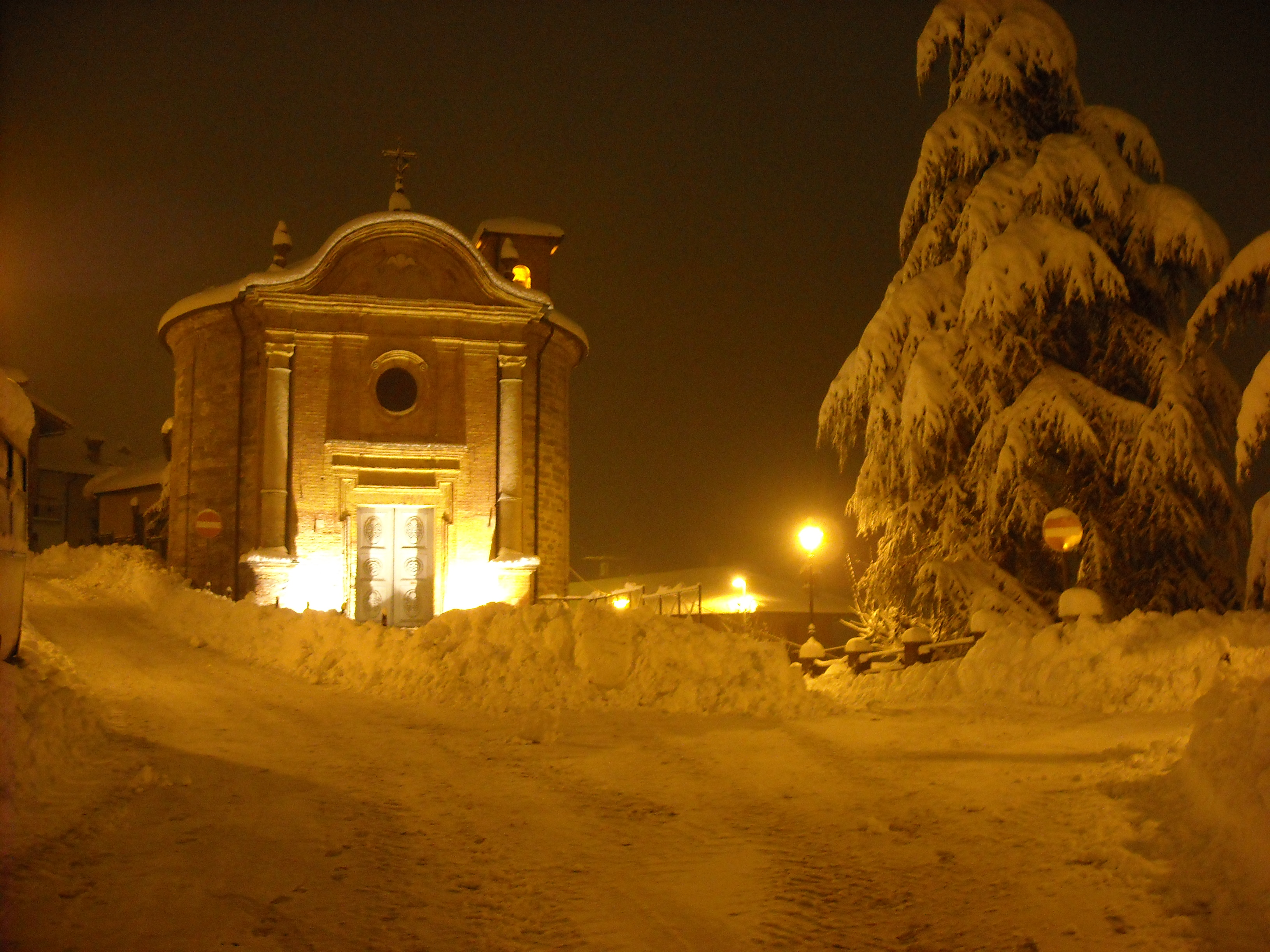 Scatto notturno della chiesa di San Rocco sotto una forte nevicata.